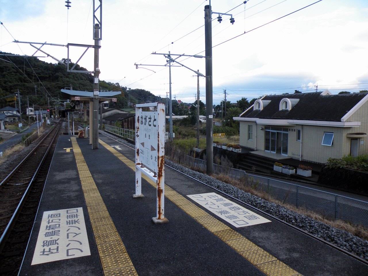 JR九州長崎本線長里駅ホームと待合室